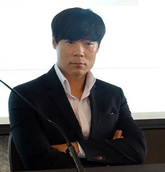 일렉트로룩스 마스터피스 컬렉션 출시 기자간담회